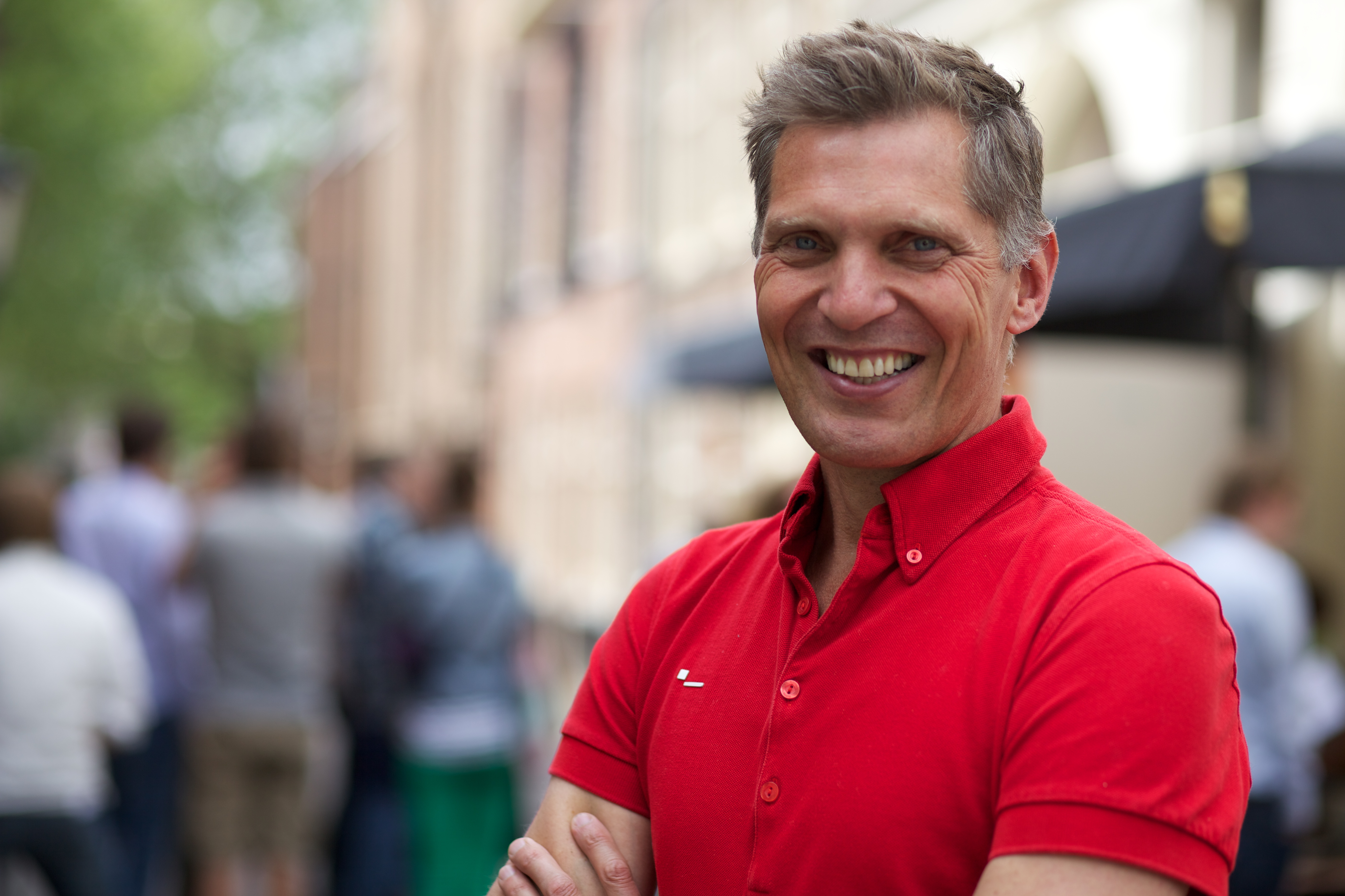 Fotograaf Erwin Olaf Springveld, geportretteerd bij de Nederlandse lancering van de anti homogeweld applicatie Bashing ( op 30 mei 2012 in Utrecht.